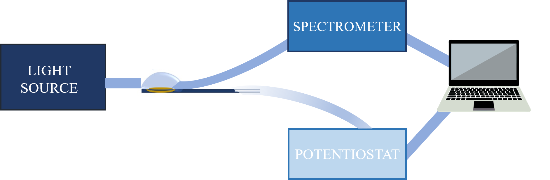 Parallel configuration scheme